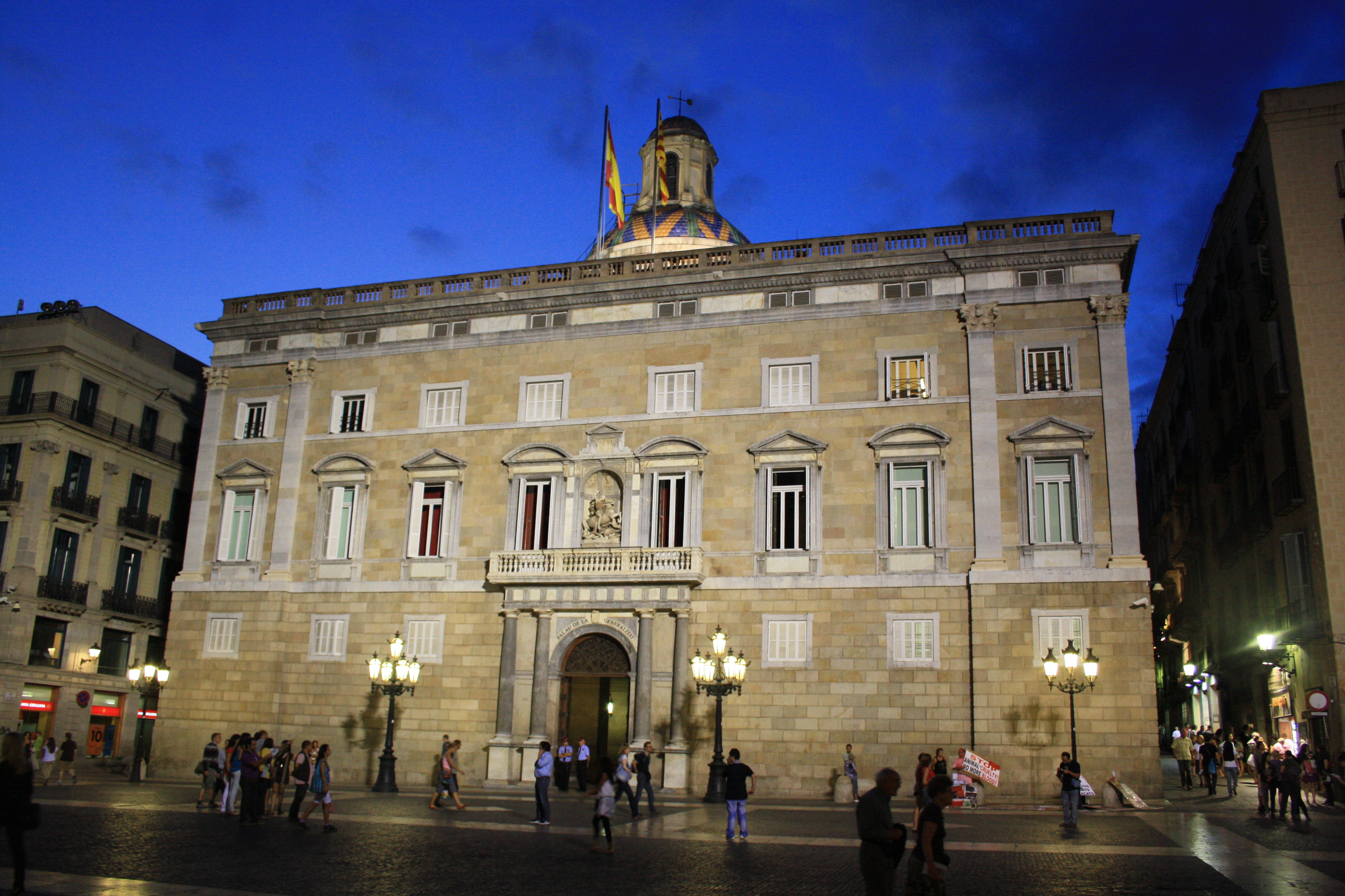 Palau de la Generalitat (Barcelona)